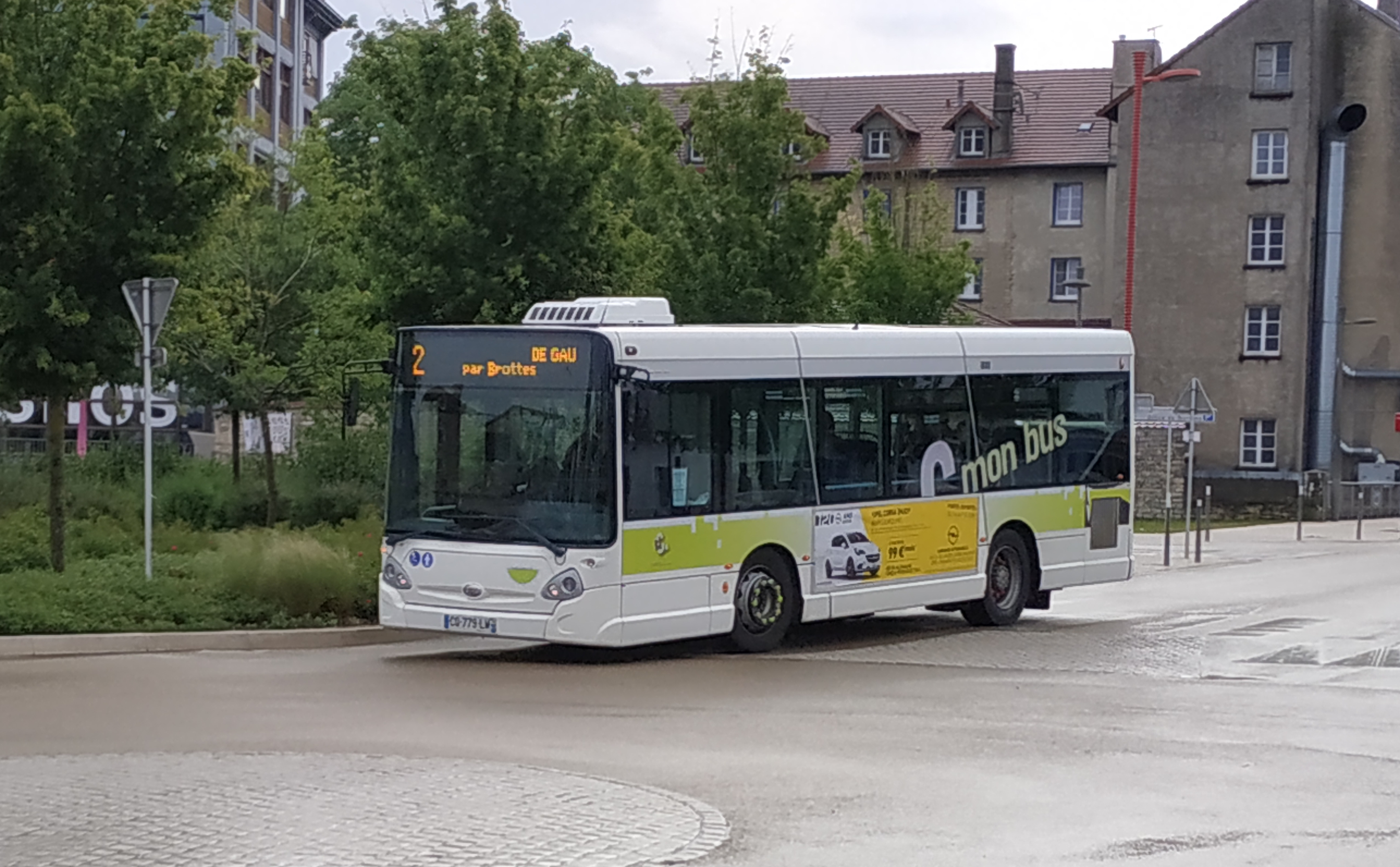 Heuliez GX 127 du réseau "Cmonbus" de Chaumont